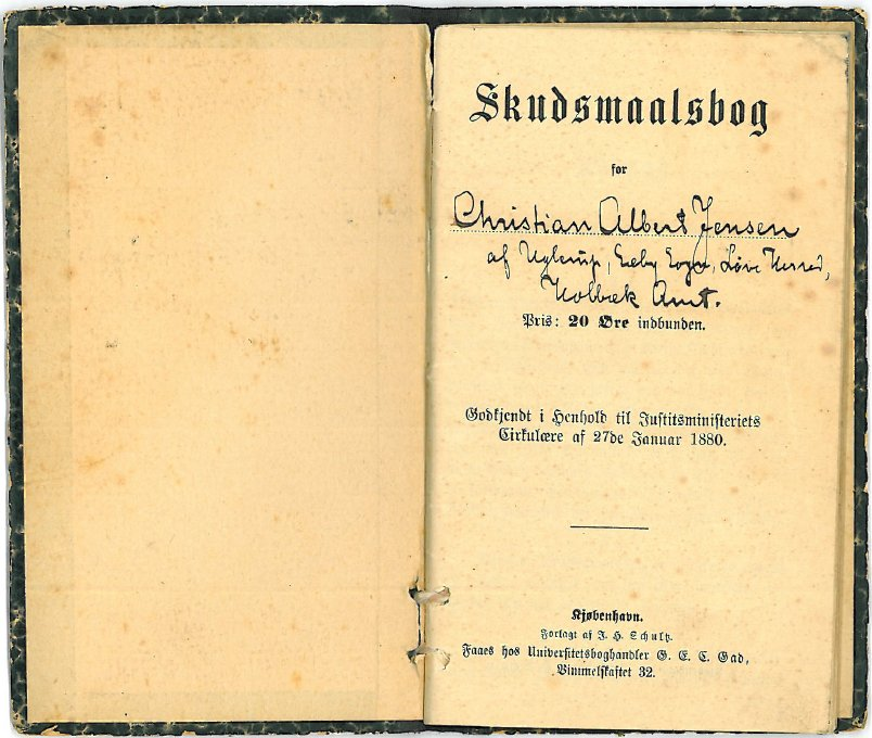 Titelside af skudsmålsbog fra 1907. Page of Danish character book from 1907 .